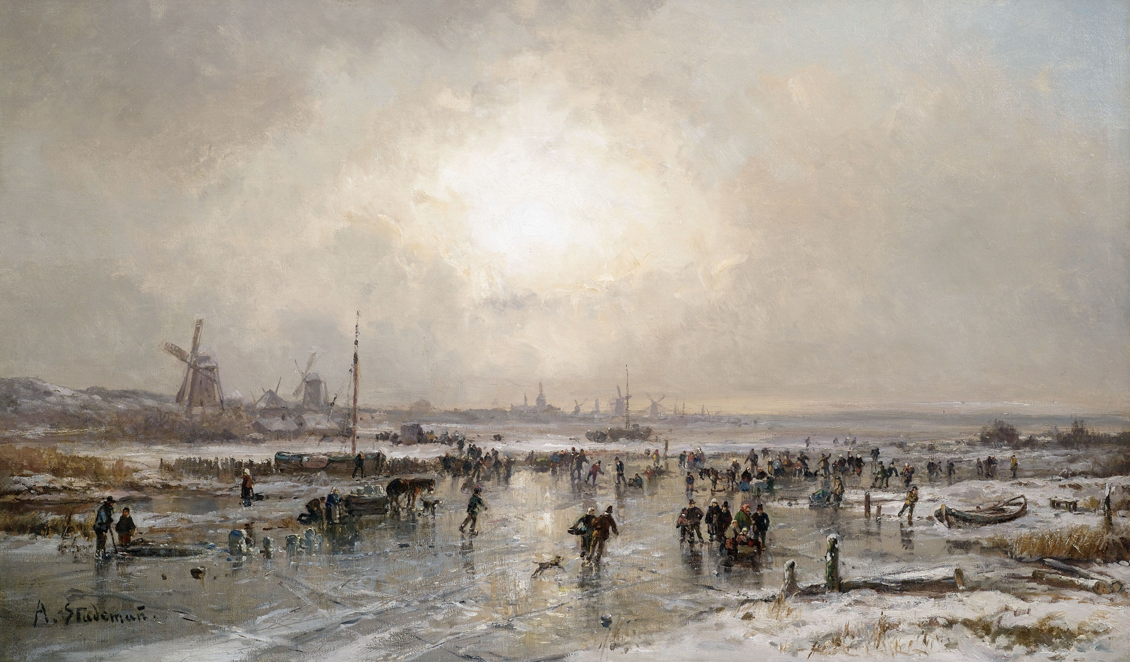 Winterliches Eisvergnügen auf einem zugefrorenen Kanal vor holländischer Stadtsilhouette. Öl/Leinwand, unten links signiert. 66 x 110 cm.